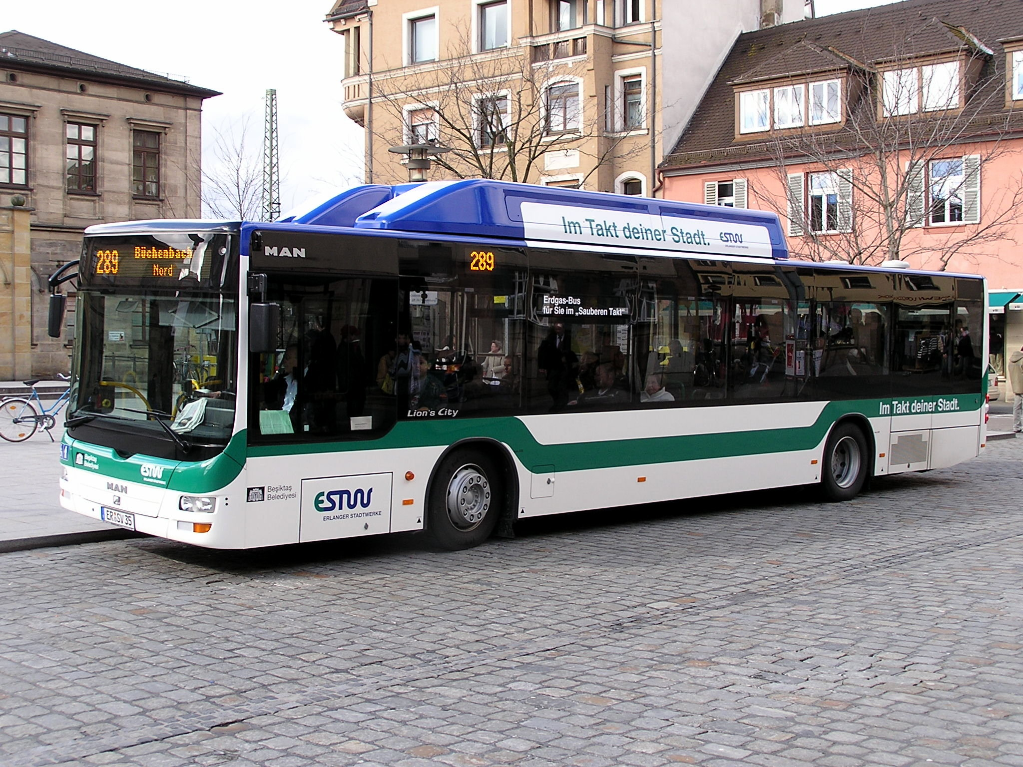 Erlanger Erdgasbus